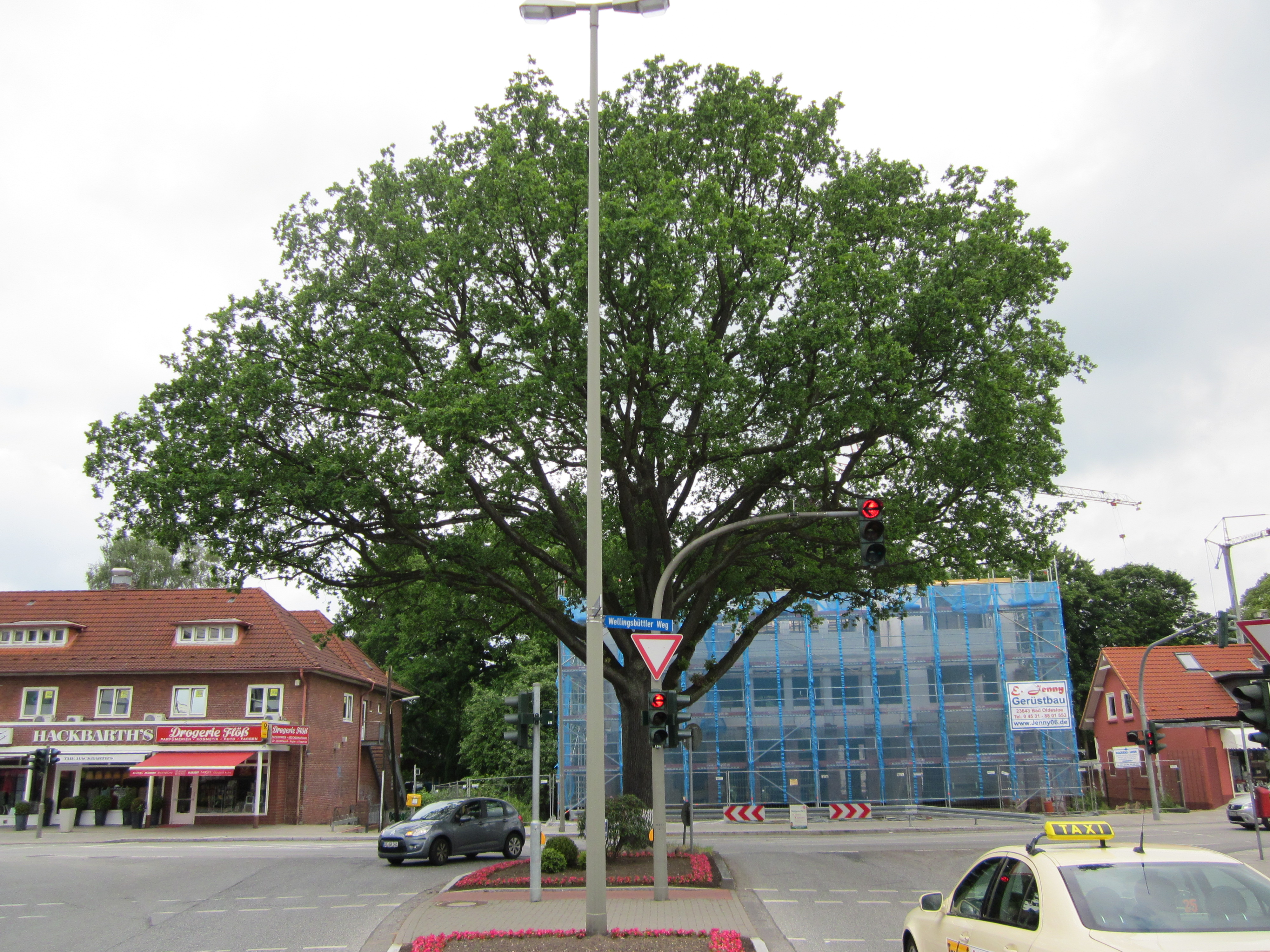 Die Friedenseiche an der Einmündung der Rolfinckstraße in den Wellingsbüttler Weg in Wellingsbüttel wurde 1871 aus Anlaß der Beendigung des deutsch-französischen Krieges vom Gastwirt und Gemeindevorsteher Peter Johann Carl Hayn gepflanzt. Dort wo im Hintergrund ein Neubau errichtet wird, stand bis 2004 das Gasthaus "Friedenseiche", das von Hayn und seinen Nachfahren geführt wurde.